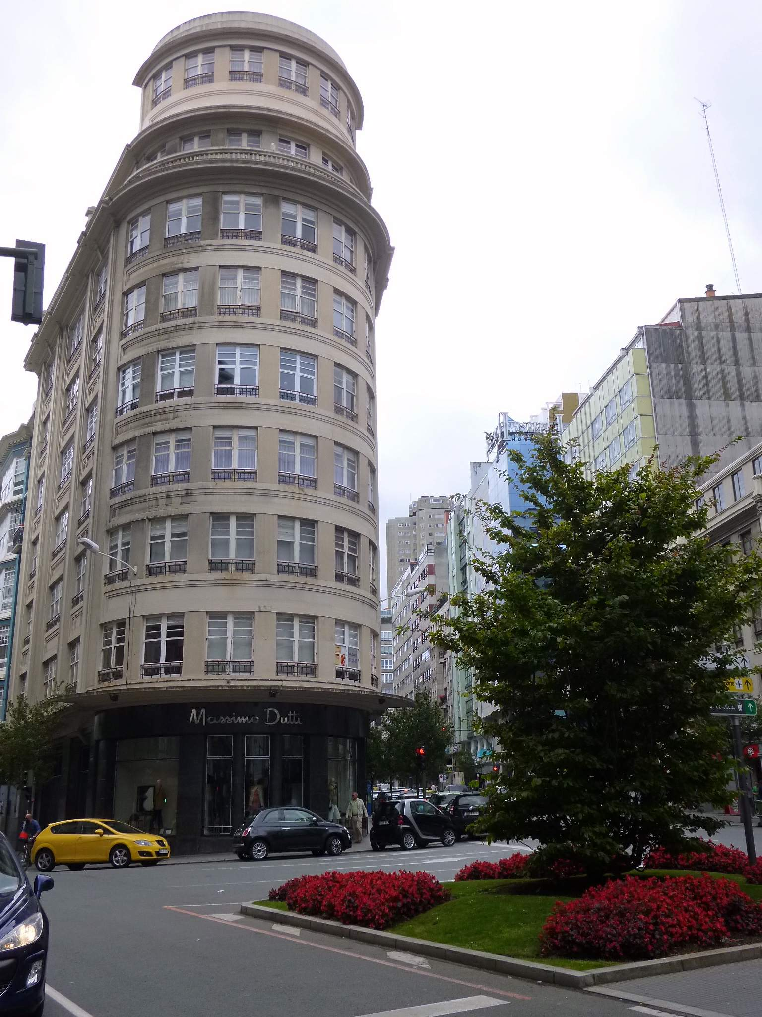 A Coruña